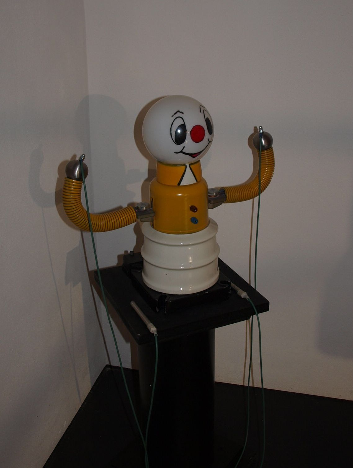 Probiermaennchen zur Messung des Koerperwiderstandes im Eigenversuch im Elektromuseum in Frastanz.